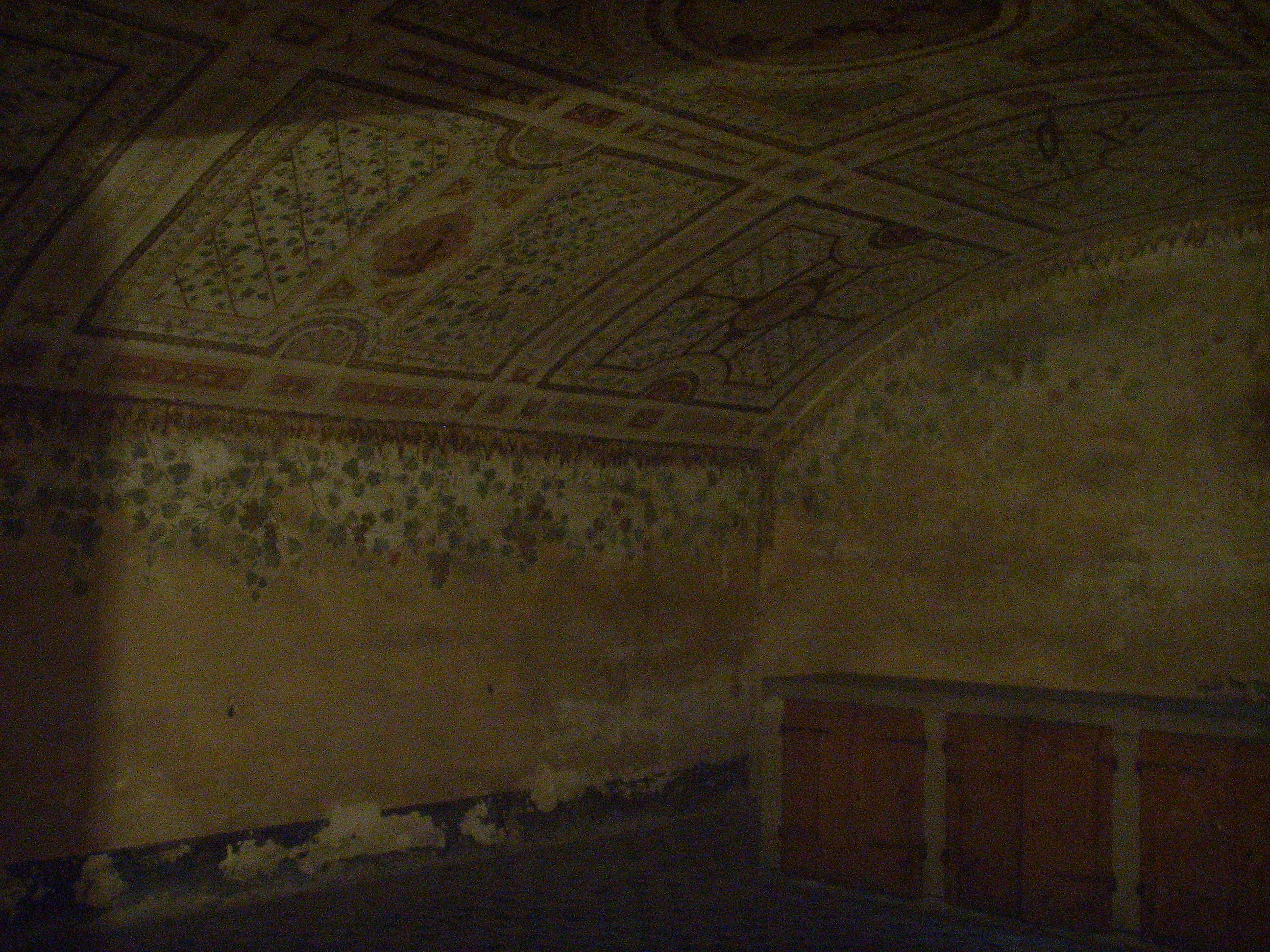 Villa Medicea di Careggi, inside in Florence, Italy